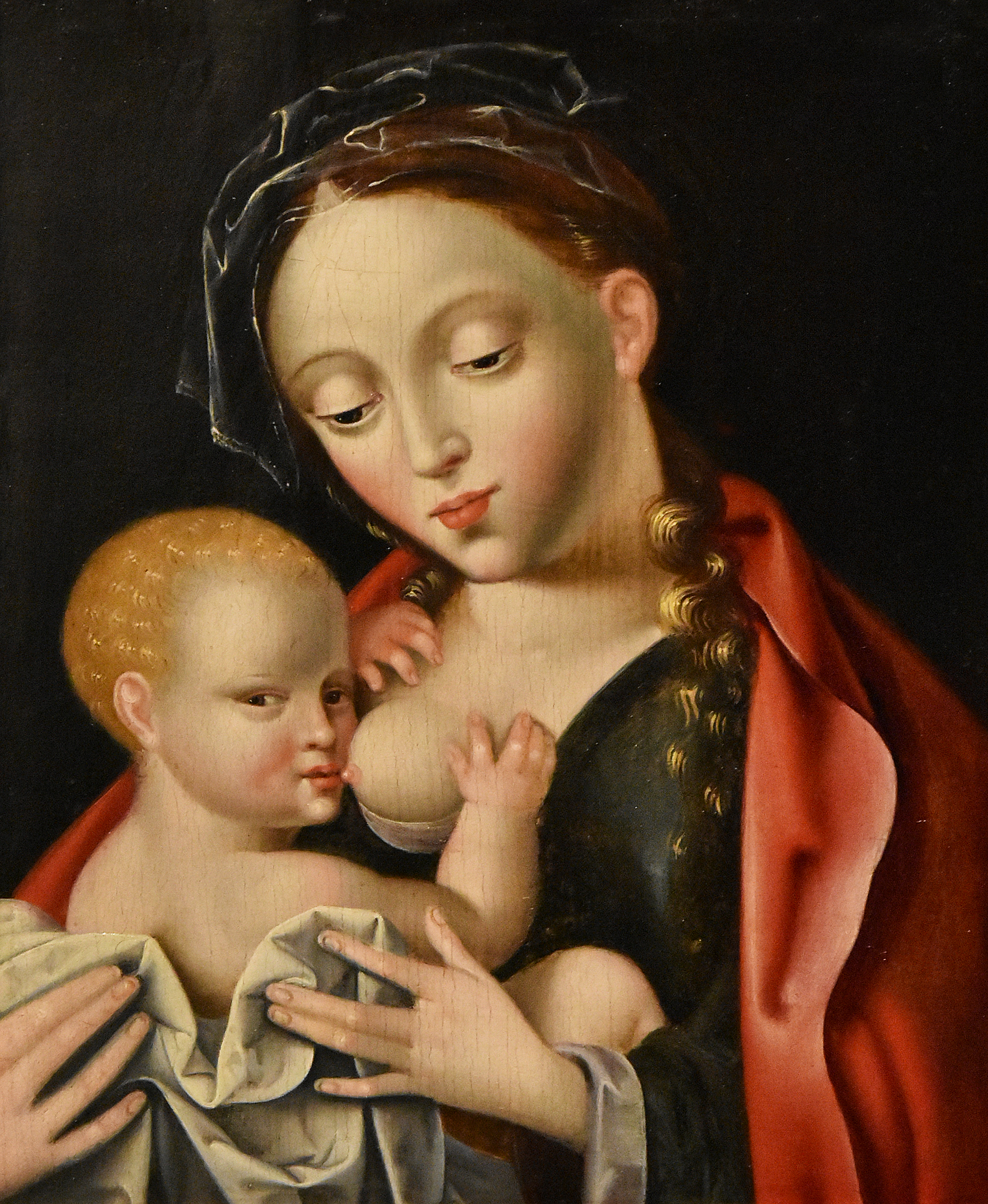 Joos van Cleve (ca.1485–1540of1541) De Maagd lacteert Jezus - La Boverie Luik 23-08-2018 This photo of movable heritage has been taken in the Walloon Region